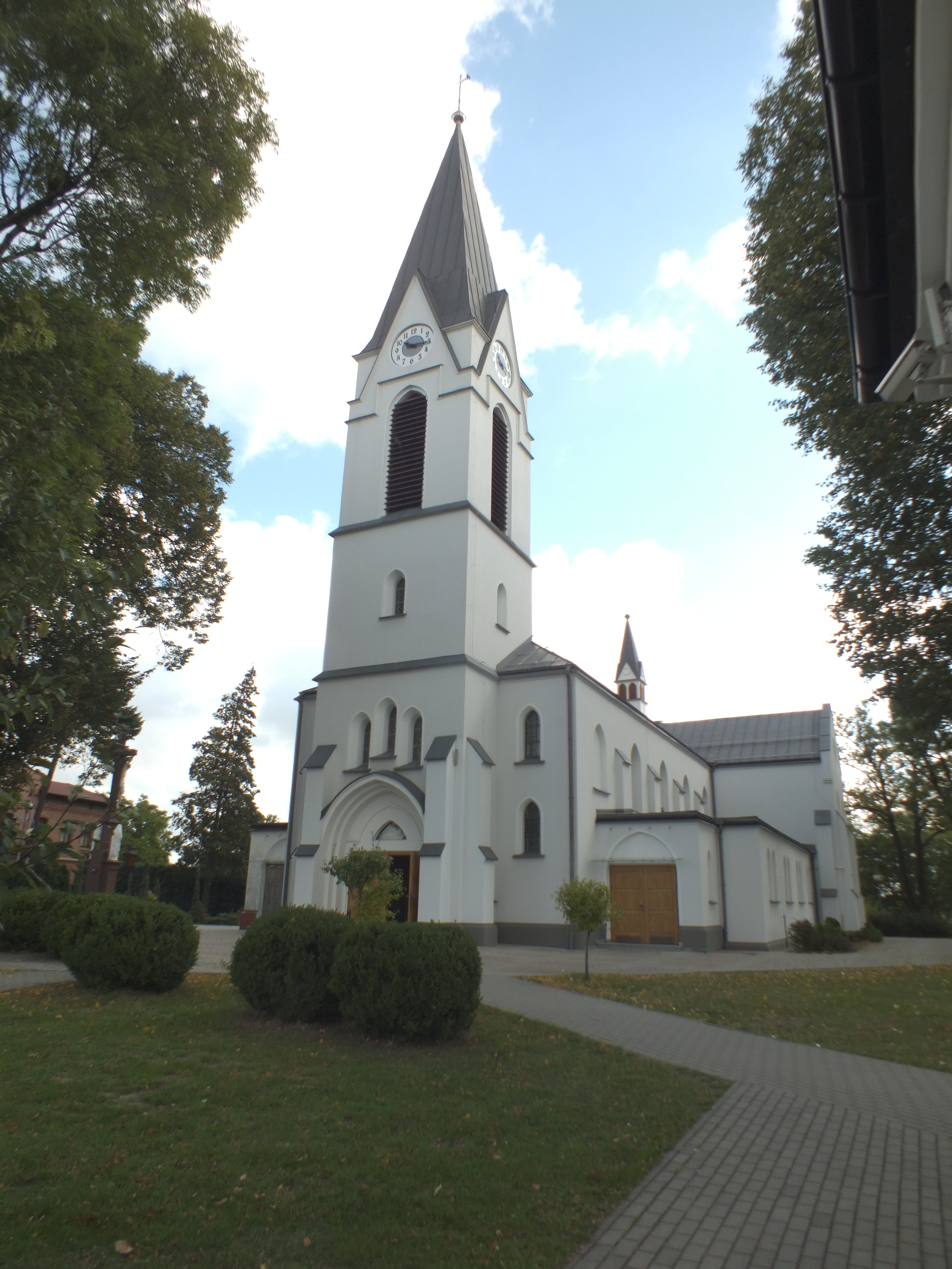 Łaziska Górne, zespół kościoła pw. Matki Boskiej Różańca Świętego